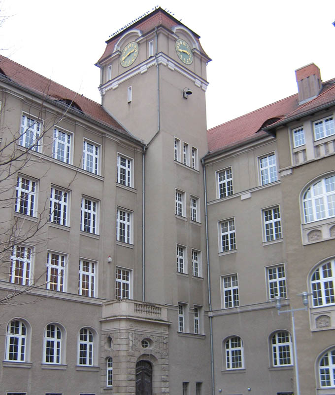 Gebäudeteil des halleschen Torgymnasiums